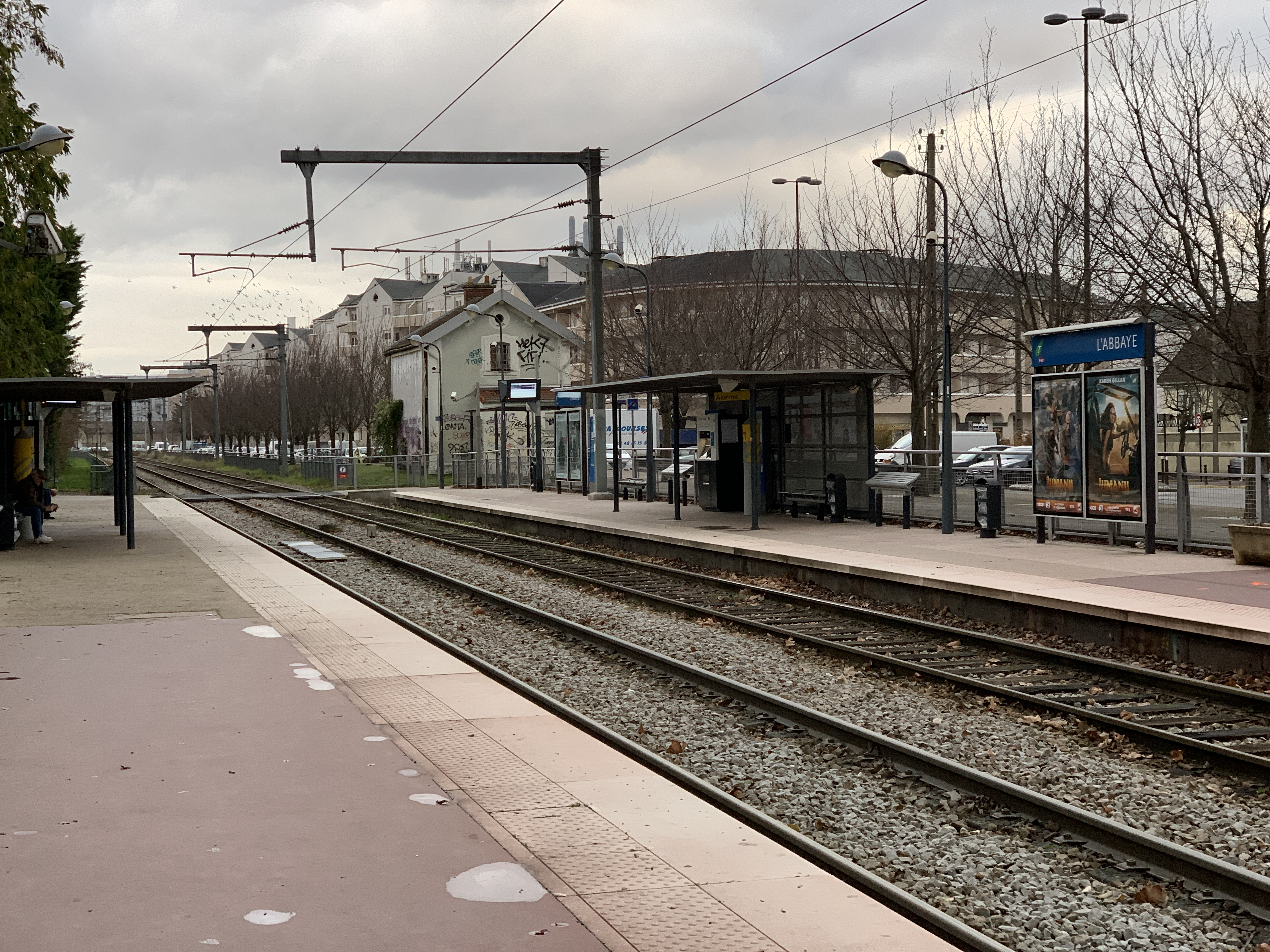 Station de tramway L'Abbaye de la ligne 4 du tramway d'Île-de-France, Livry-Gargan.